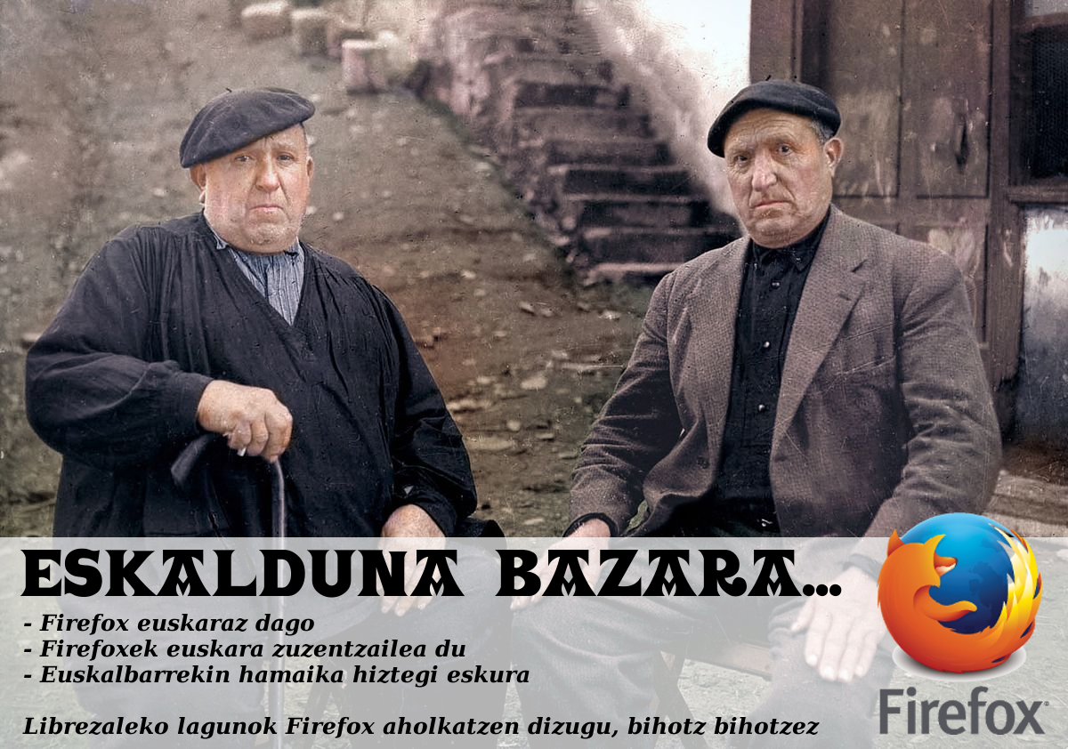 Librezale taldearen publizitate kanpaina gizarte sareen bidez. Firefox nabigatzailea (software librea) euskaraz erabiltzeko aholkua, Xuxen eta Euskalbar Firefoxen gehigarriak erabil daitezkeela azpimarratuz.